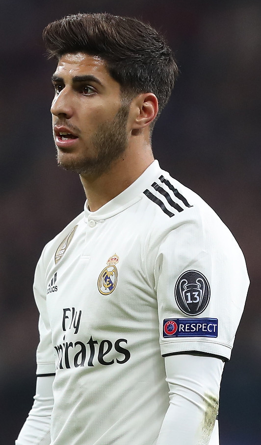 ЦСКА бьёт «Реал» при полных «Лужниках»